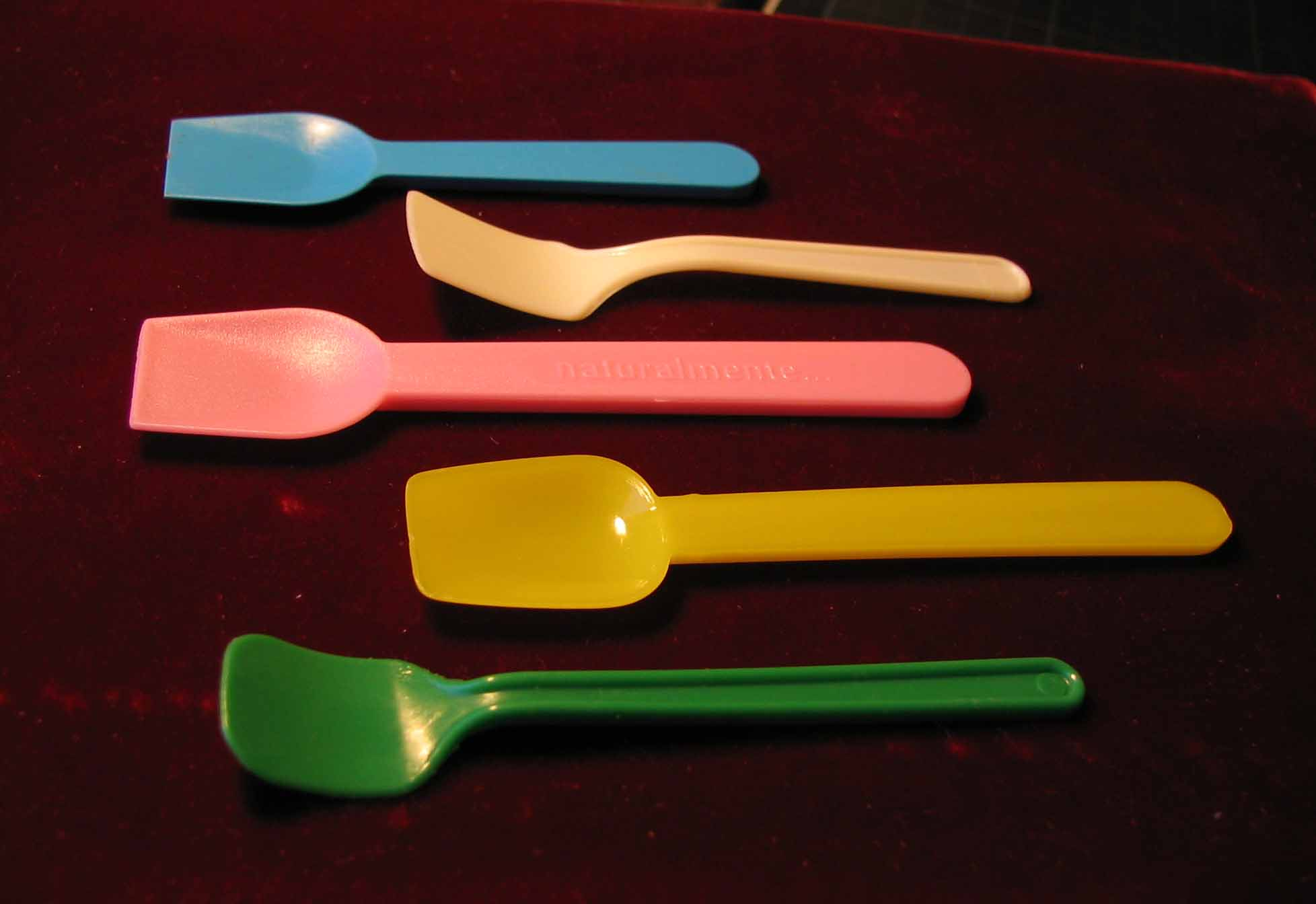 Eisspatel